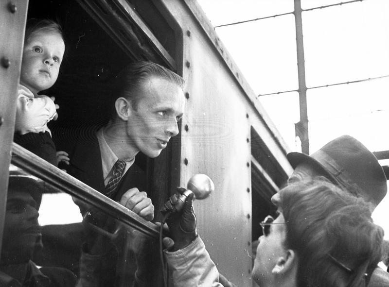 Berlin: Verkehrsbeschränkung aufgehoben. Am 12.5.1949 um 14.00 fuhr der erste Interzonenzug vom Bahnhof Friedrichstraße ab. UBz: Ein kleines Gespräch vor der Abfahrt zwischen dem Rundfunkreporter und den Fahrgästen des ersten Interzonenzuges. Aufn.: Illus Rudolph 3250-49 12.5.49